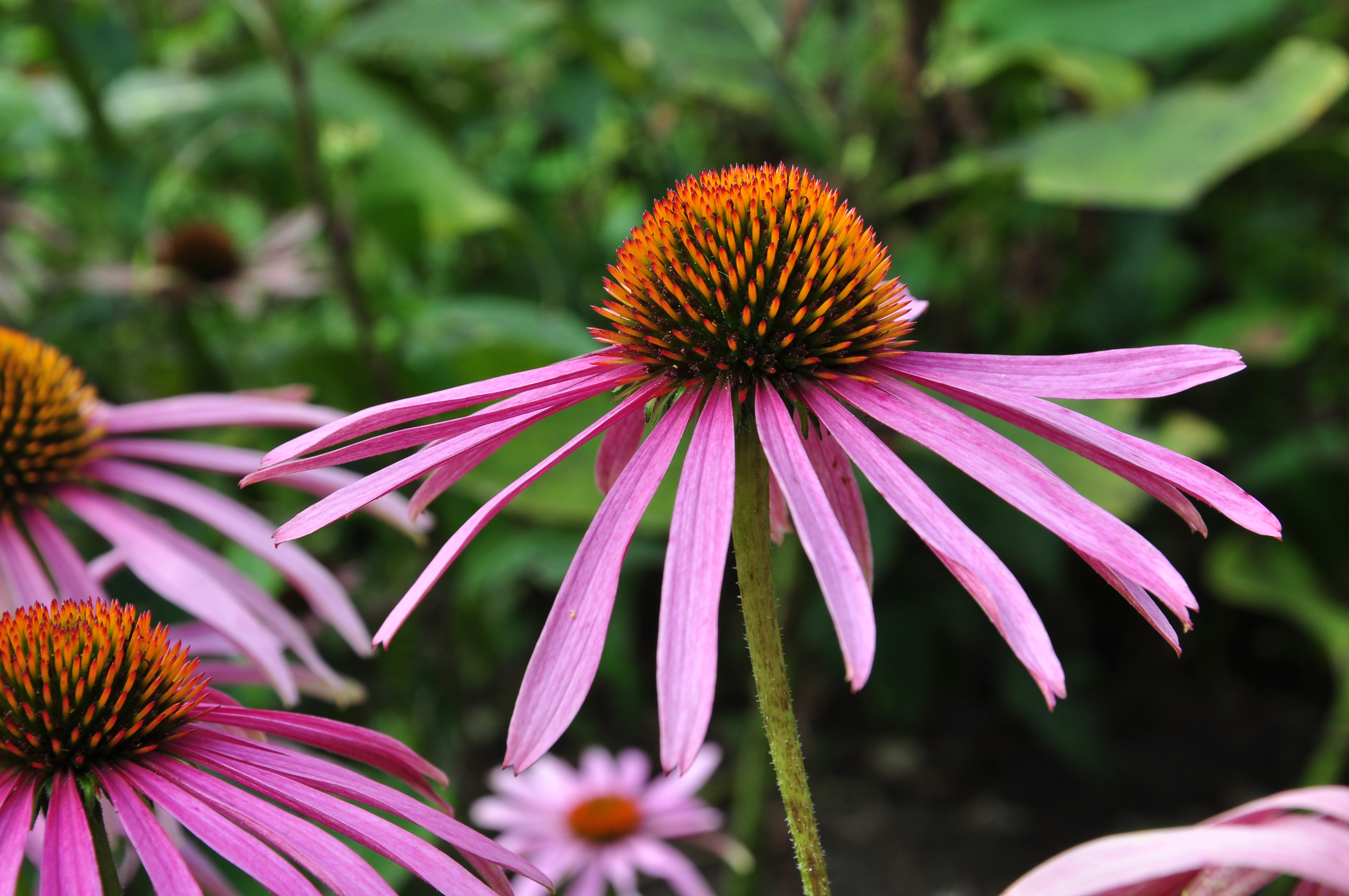 Botanischer Garten der Universität Zürich in Zürich-Weinegg (Switzerland) : Echinacea purpurea